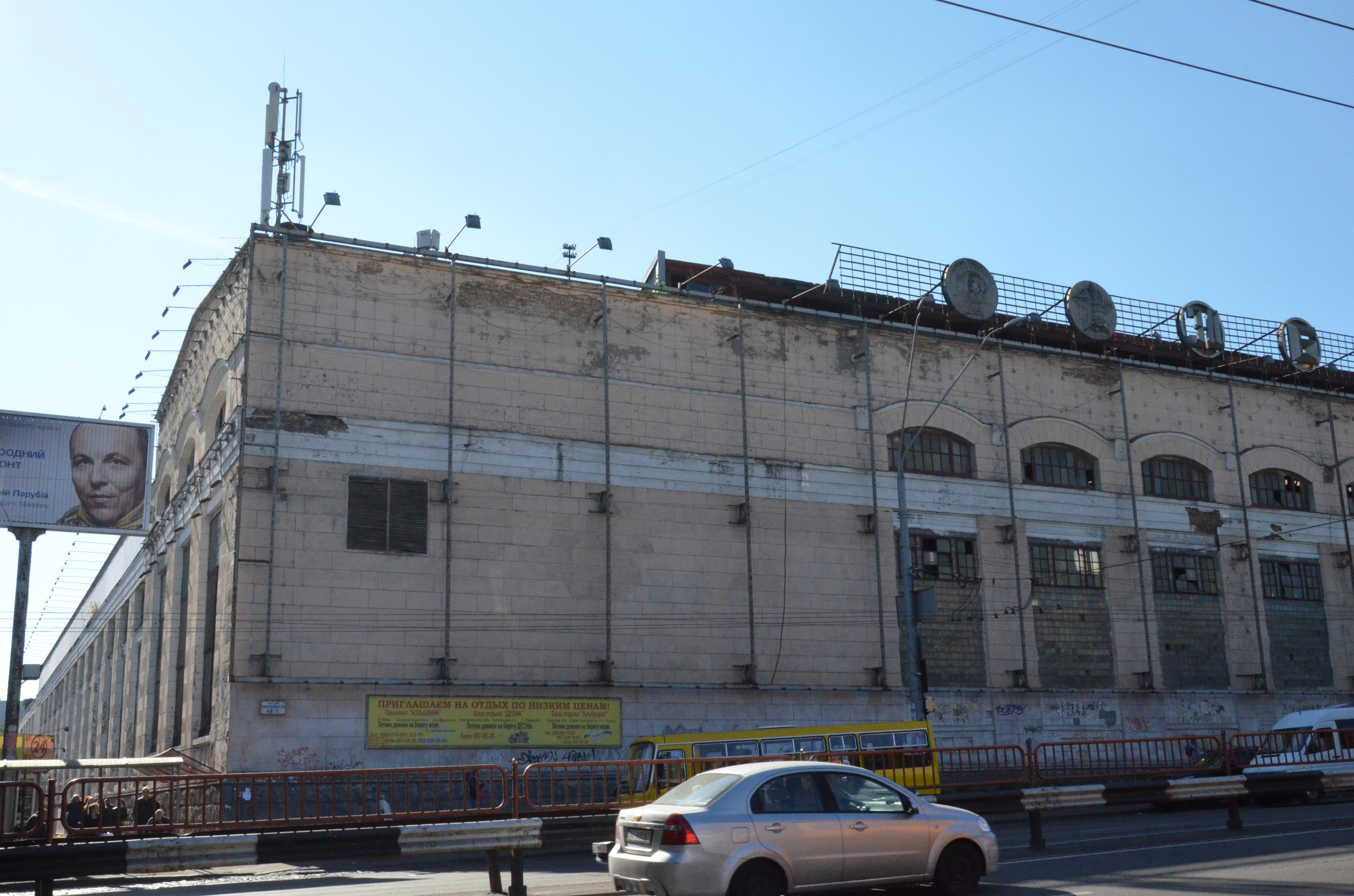 Завод Я. Гретера та О. Криваненка, робітники якого під час революції 1905 року створили «Шулявську робітничу республіку»; у жовтні 1917 року та січні 1918 року брали участь у збройному повстанні; працювали Герої Радянського Союзу, учасники Другої Світової війні, Київ, Гетьмана Вадима вул., 2-4